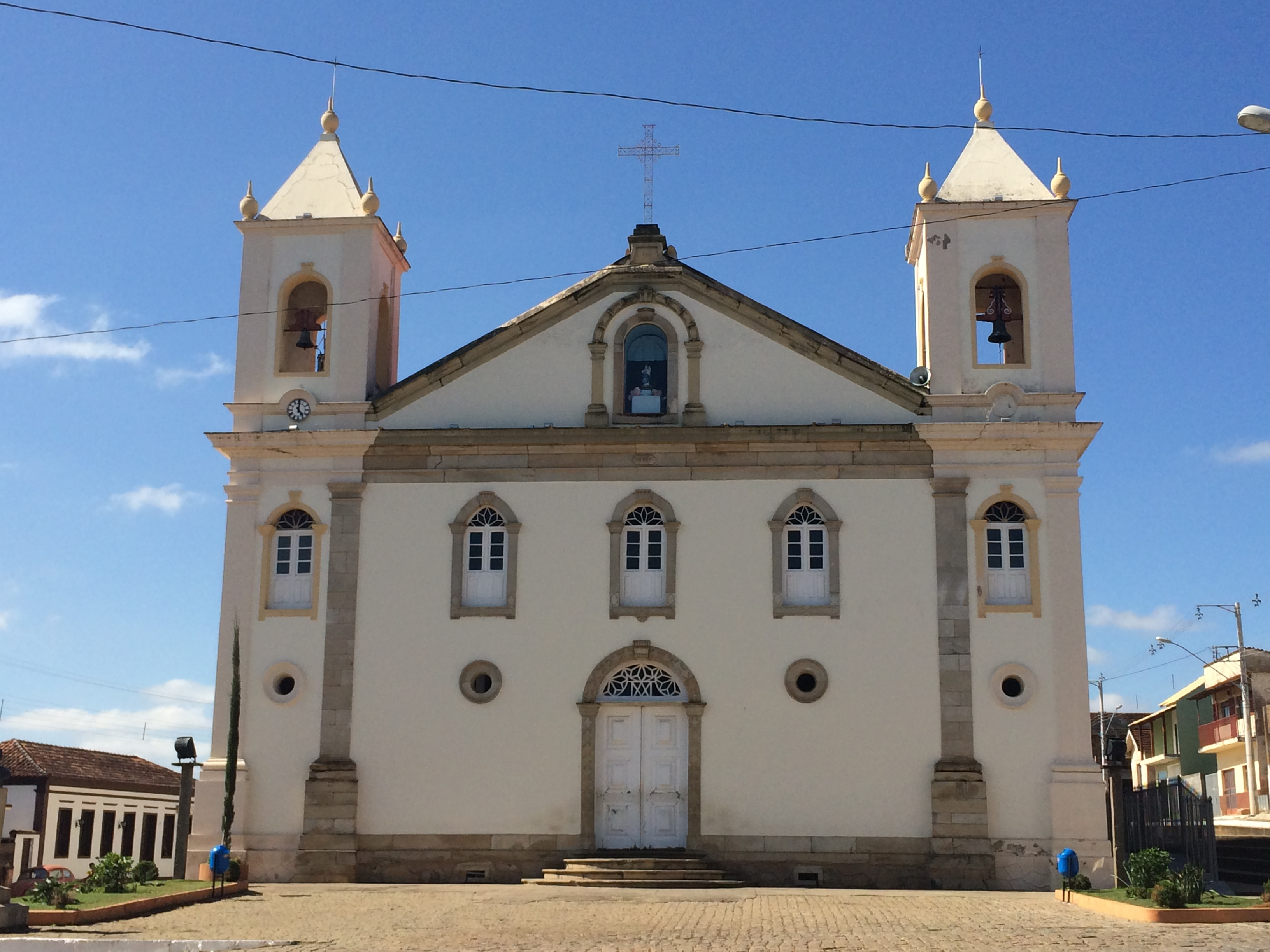 Igreja Matriz de Nazareno - MG